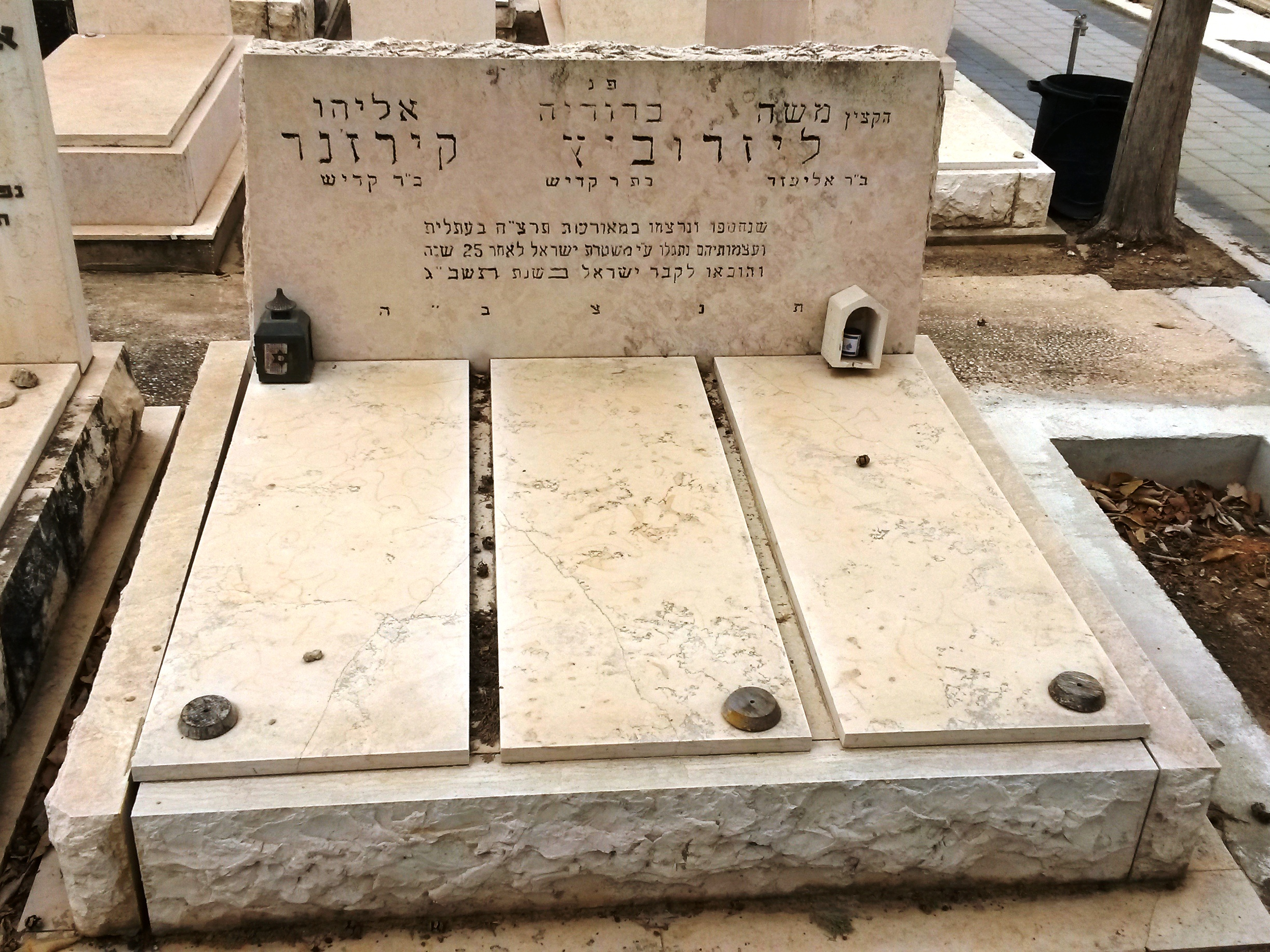 קברי הנרצחים בבית העלמין "גני אסתר" בראשון לציון